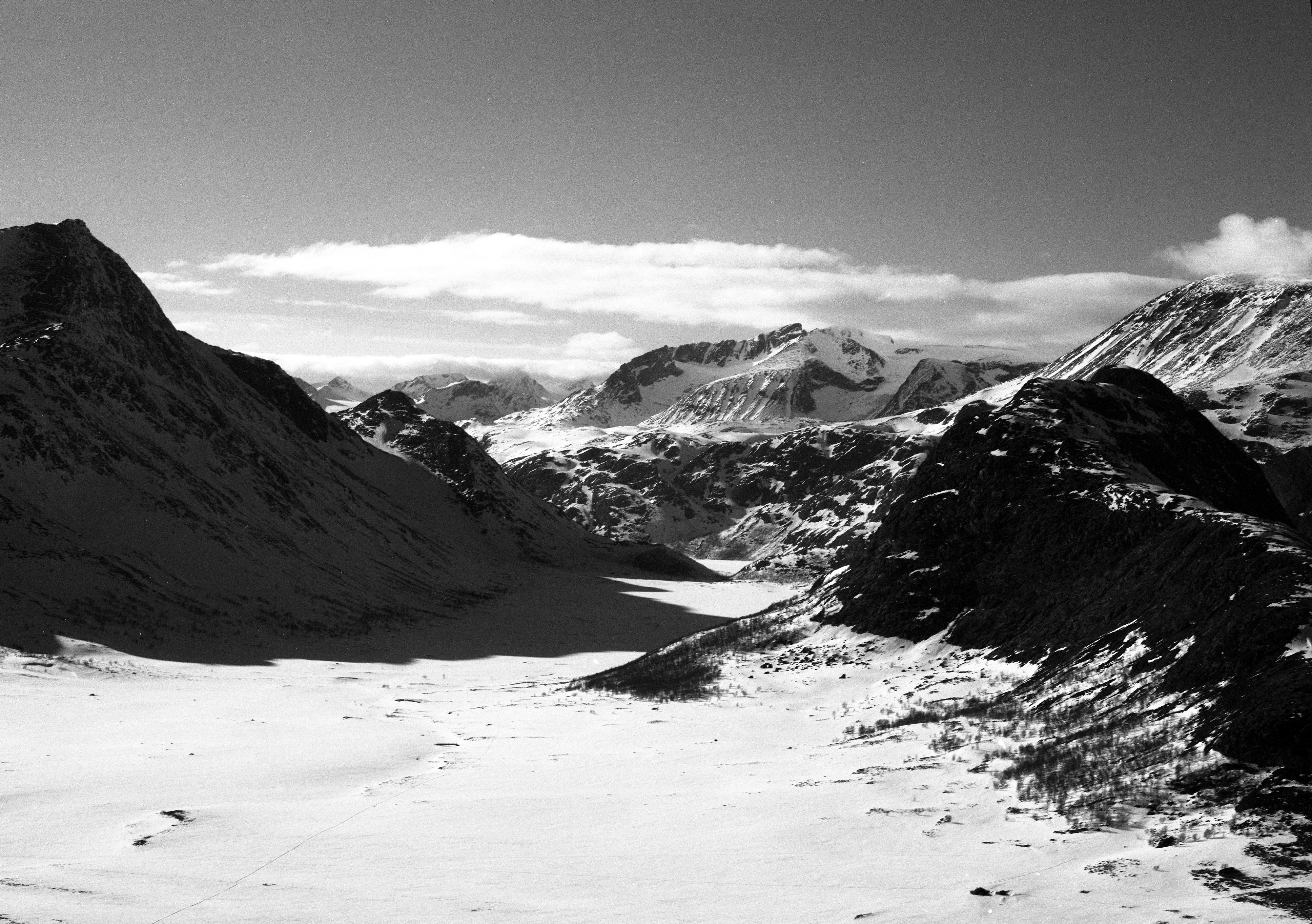 Flyfoto ut Leirungsdalen i retning nordover med Bukkehåmåren til venstre og Knutshøe til høyre